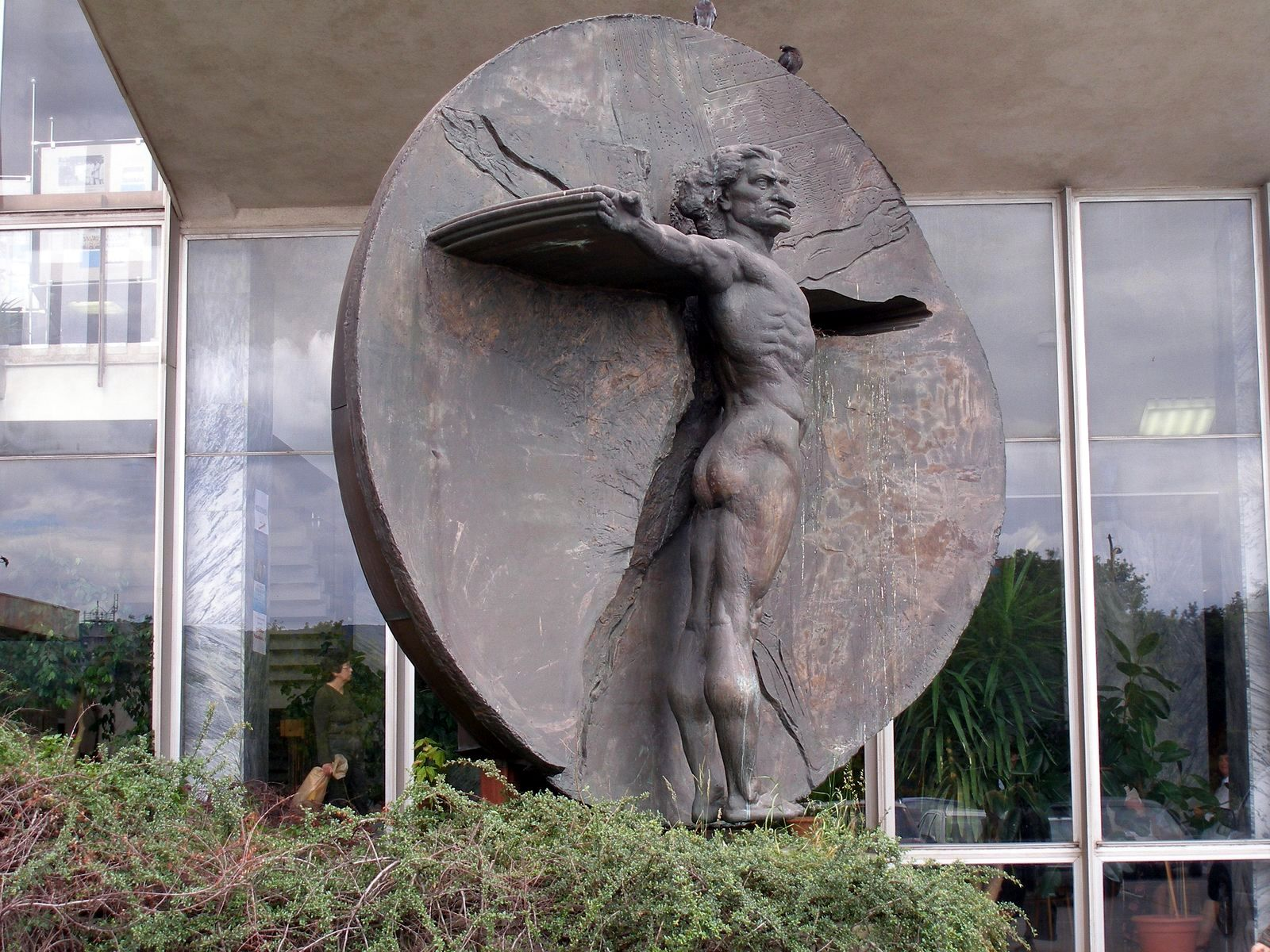 Plastika Leonardo da Vinci pred aulou Lekárska fakulta UPJŠ v Košiciach